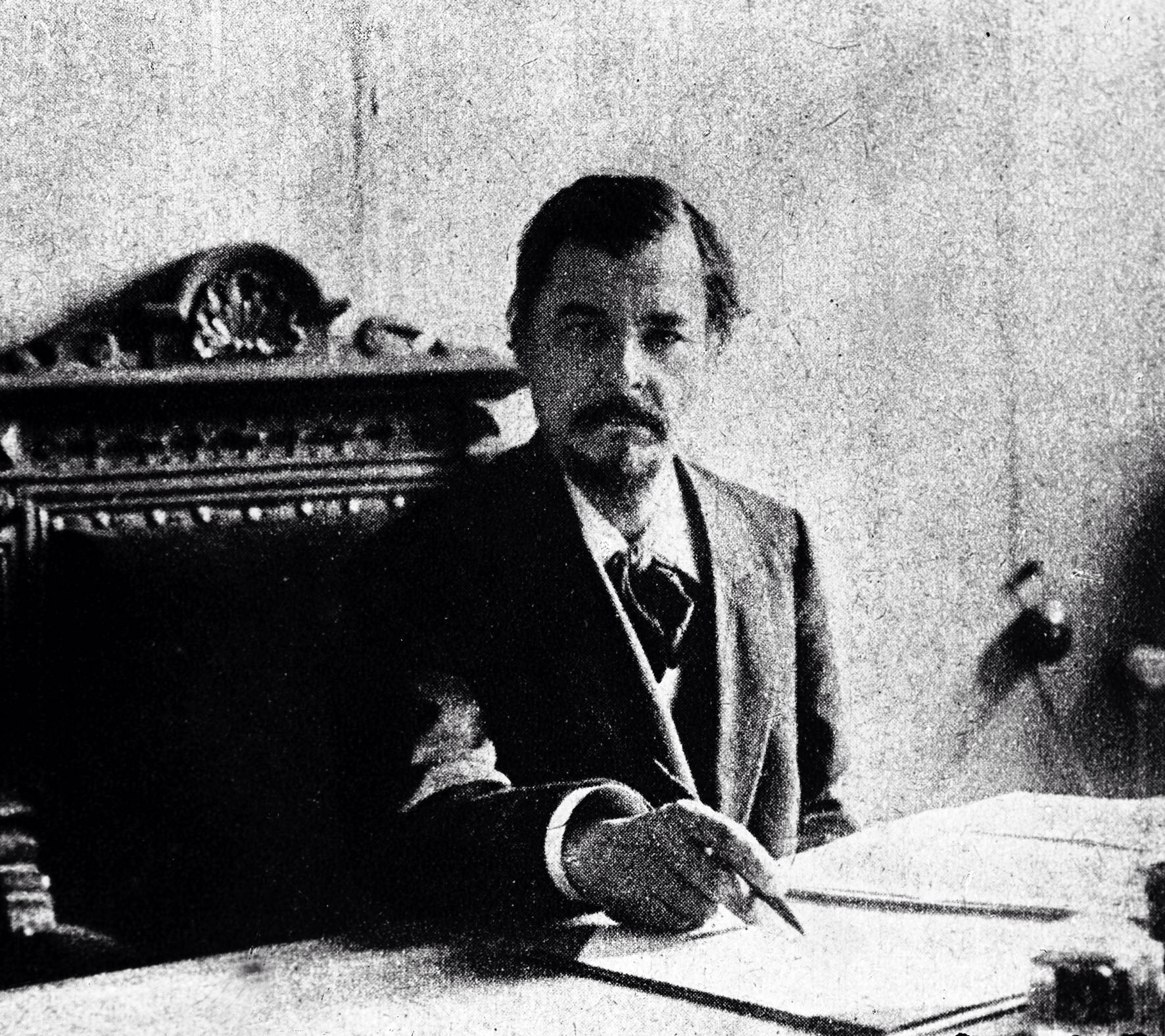 С. П. Шелухін – міністр судових справ і міністр юстиції в уряді Української Центральної Ради та Директорії. [1918 р.]. ЦДКФФА України ім. Г.С.Пшеничного, од. Обл. 0-30834